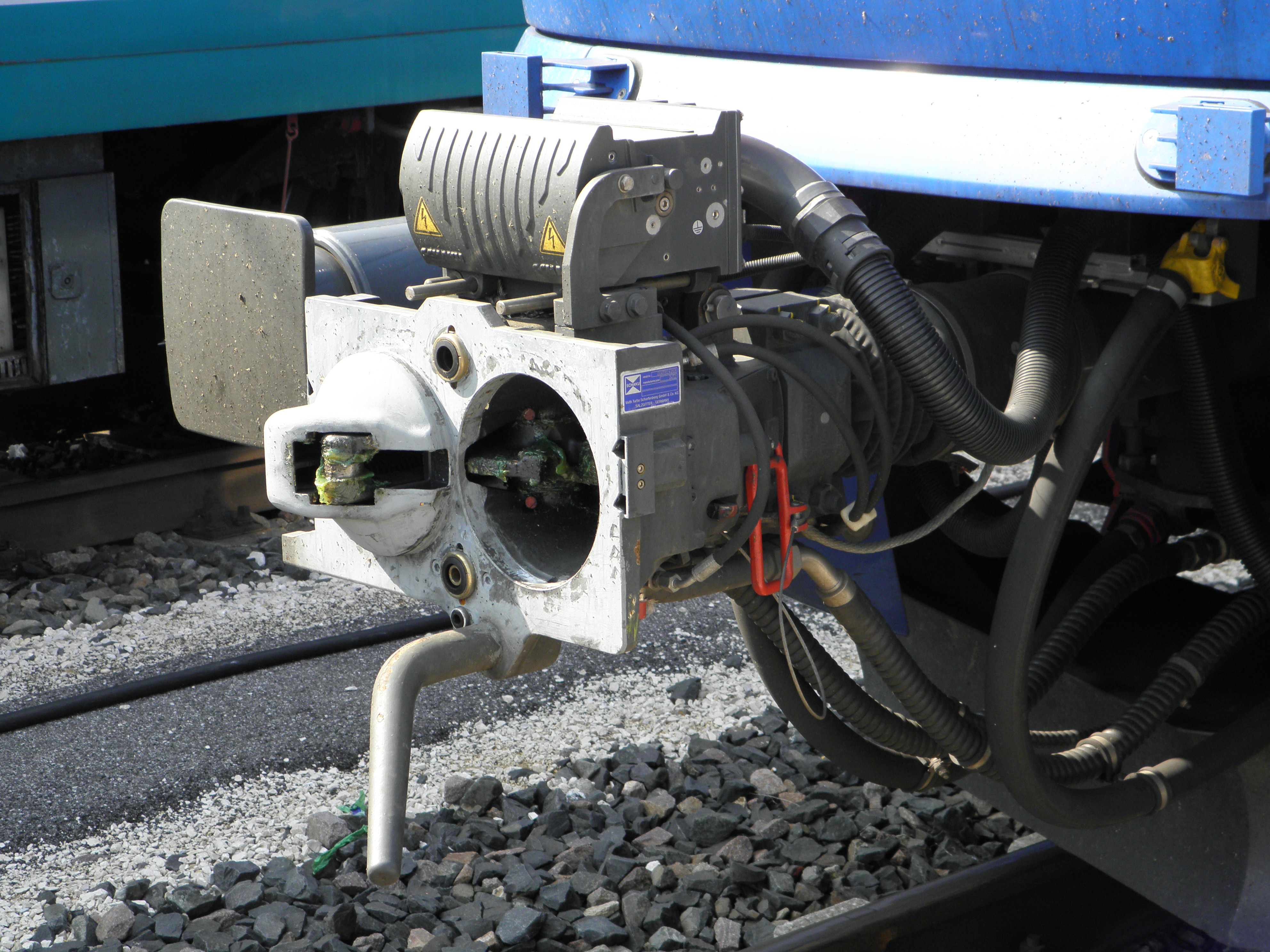 Stazione di Legnago, dettaglio della FLIRT ETR 340.004 Sistemi Territoriali in sosta al binario 6.